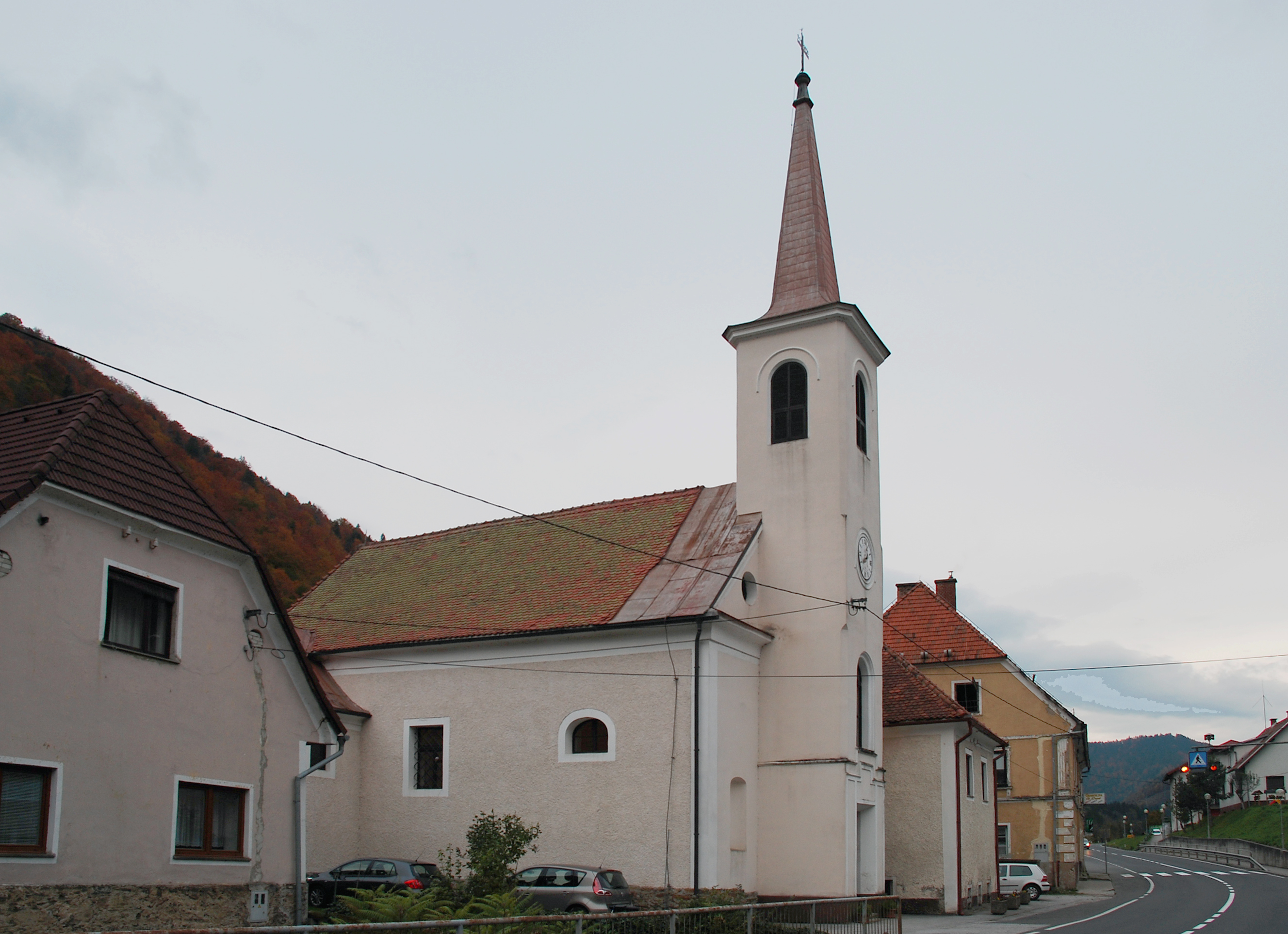 Pfarrkirche von Ožbalt (St. Oswald im Drauwald, St. Oswald an der Drau) Slowenien